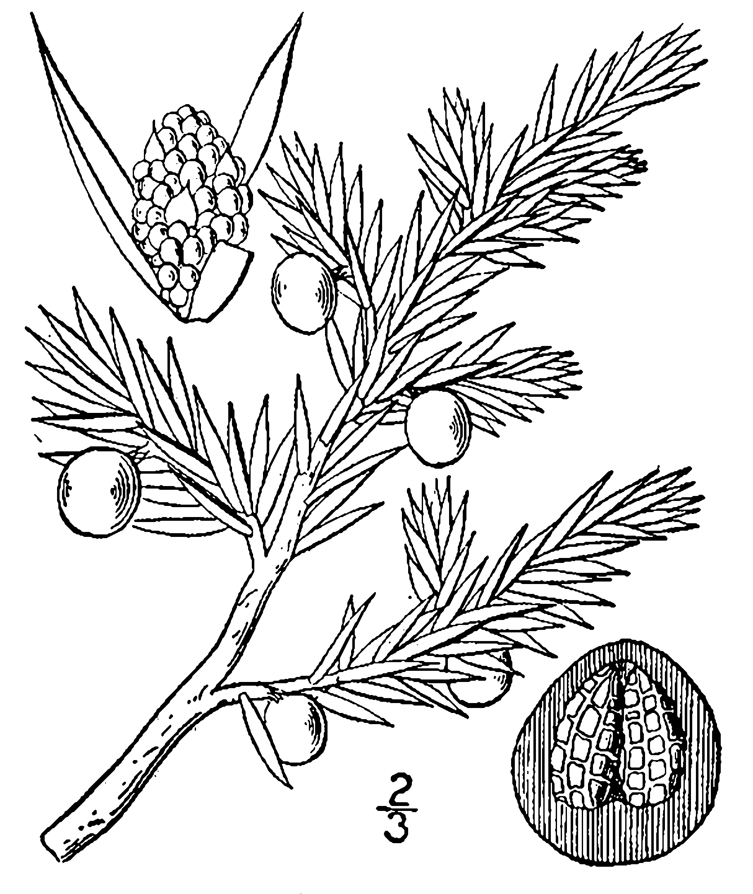 Juniperus communis L. subsp. alpina (Suter) Čelak. Common Juniper. Synomys: Juniperus communis L. var. montana; Juniperus sibirica; Juniperus alpina. Drawing.